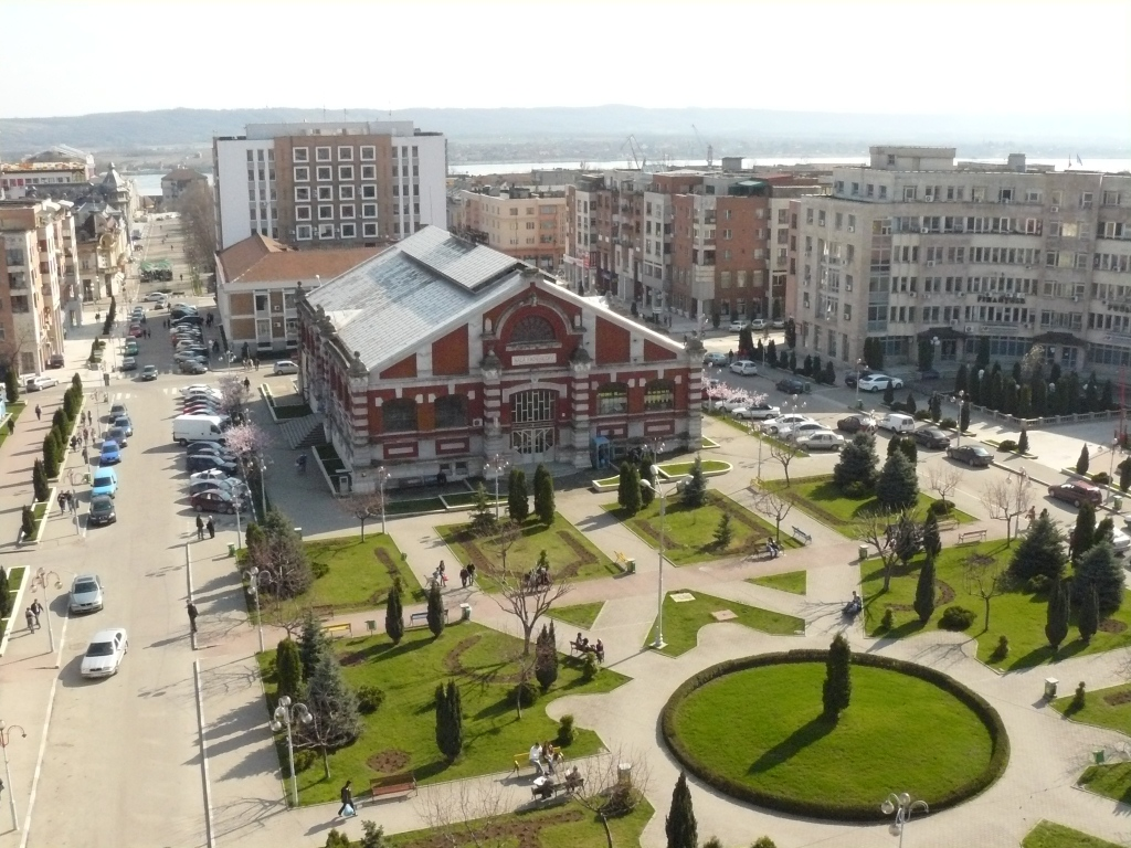 Hala Radu Negru